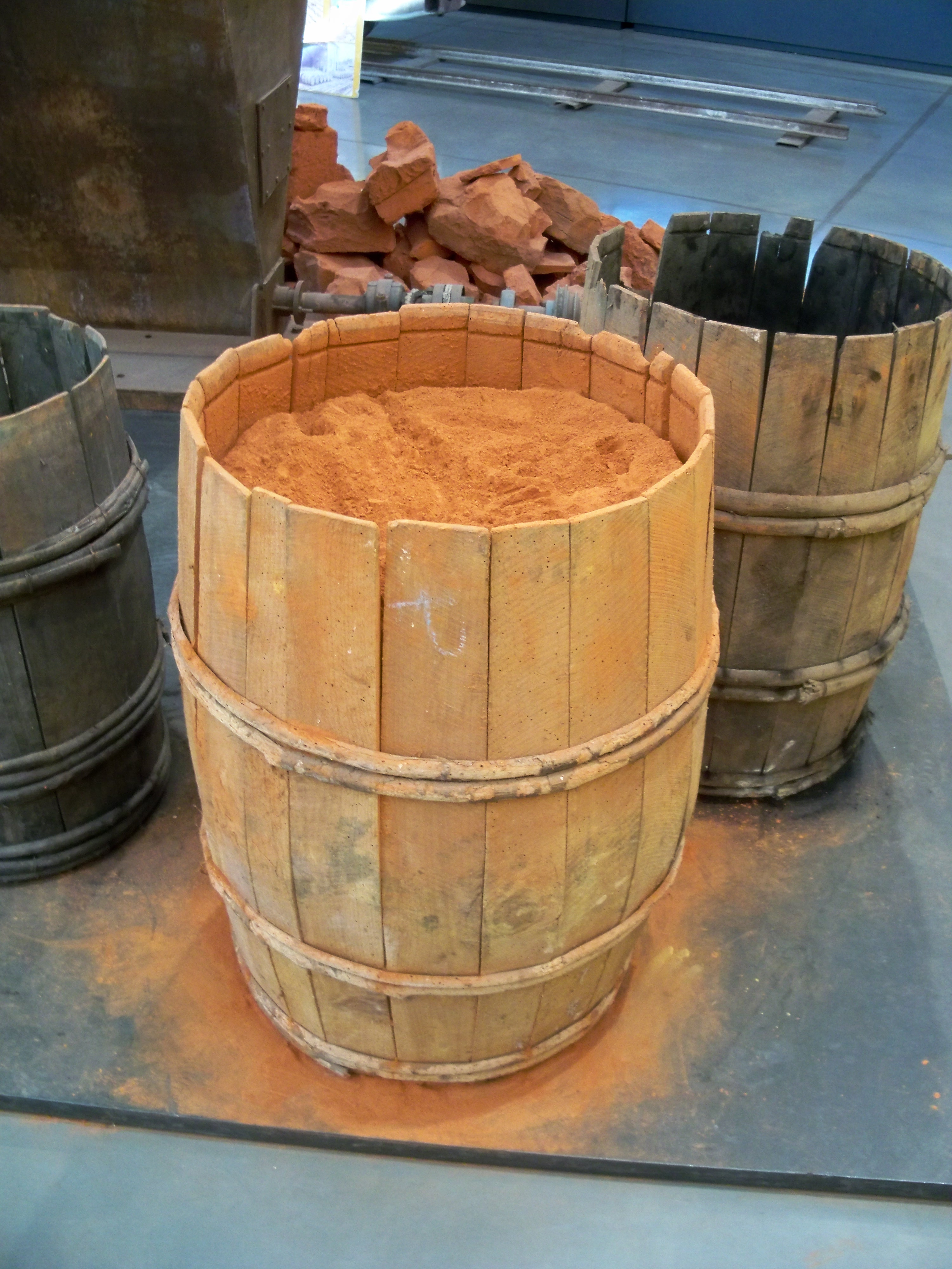 tonneau d'ocre rouge